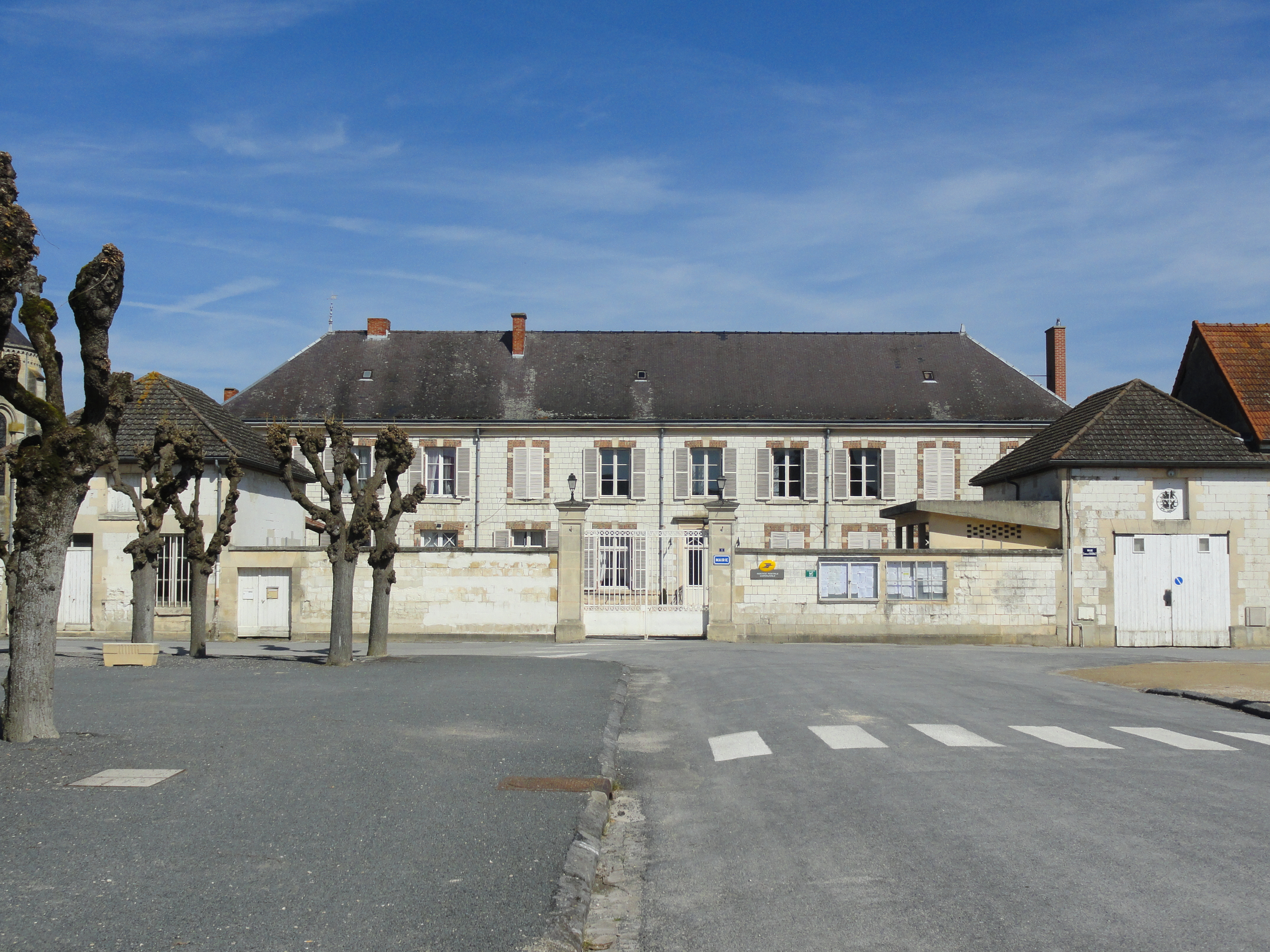 Vue de la mairie d'Athis, qui accueille également le bureau de poste du village.